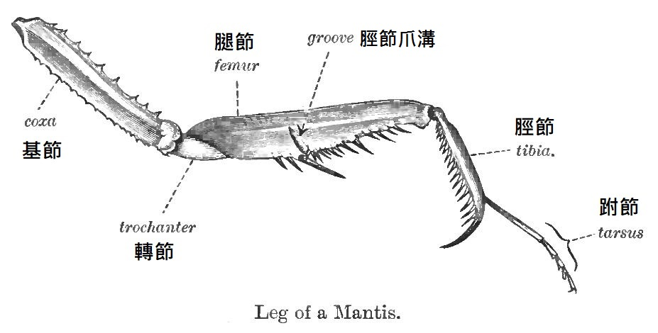 螳螂的步足